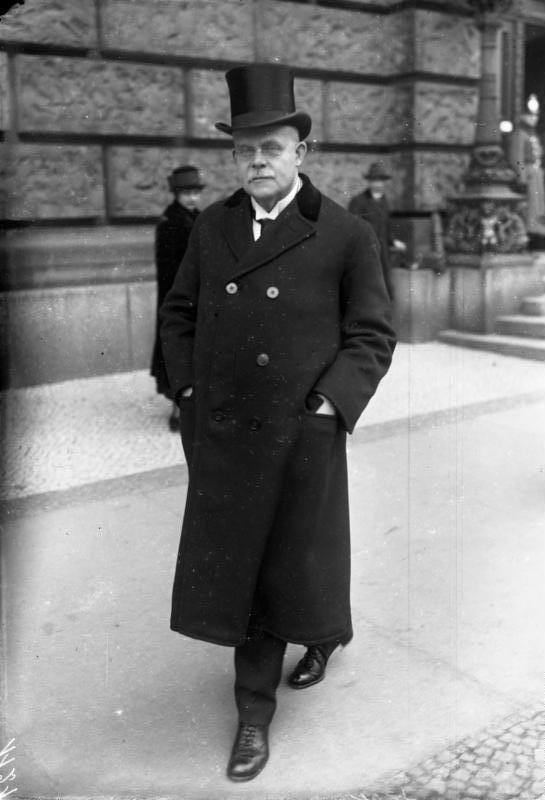 Berlin. Die Gedenkfeier für die Gefallenen des Weltkrieges fand unter Anwesenheit der Reichsregierung im Plänarsitzungssaal des Reichstages statt. Die Gedenkfeier gestaltete sich gleichzeitig zu einer Trauerkundgebung für den verstorbenen Reichspräsidenten Ebert. Der ehemalige Reichskanzler Marx nach der Gedenkfeier.